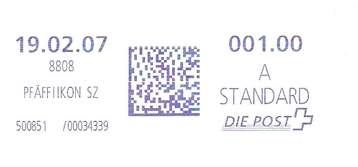 postage in Switzerland